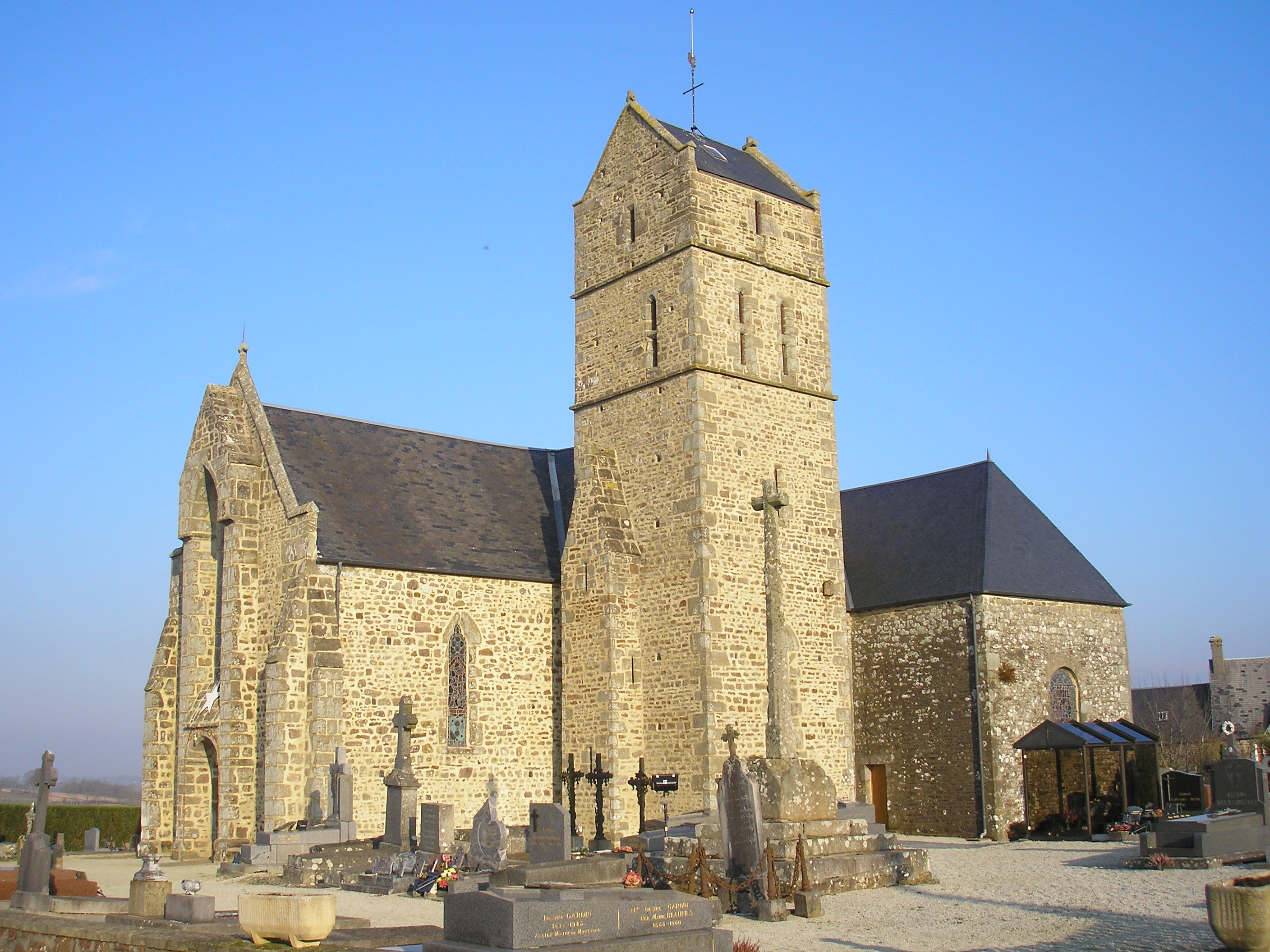 Montaigu-les-Bois (Normandie, France). L'église Saint-Martin de Montaigu.